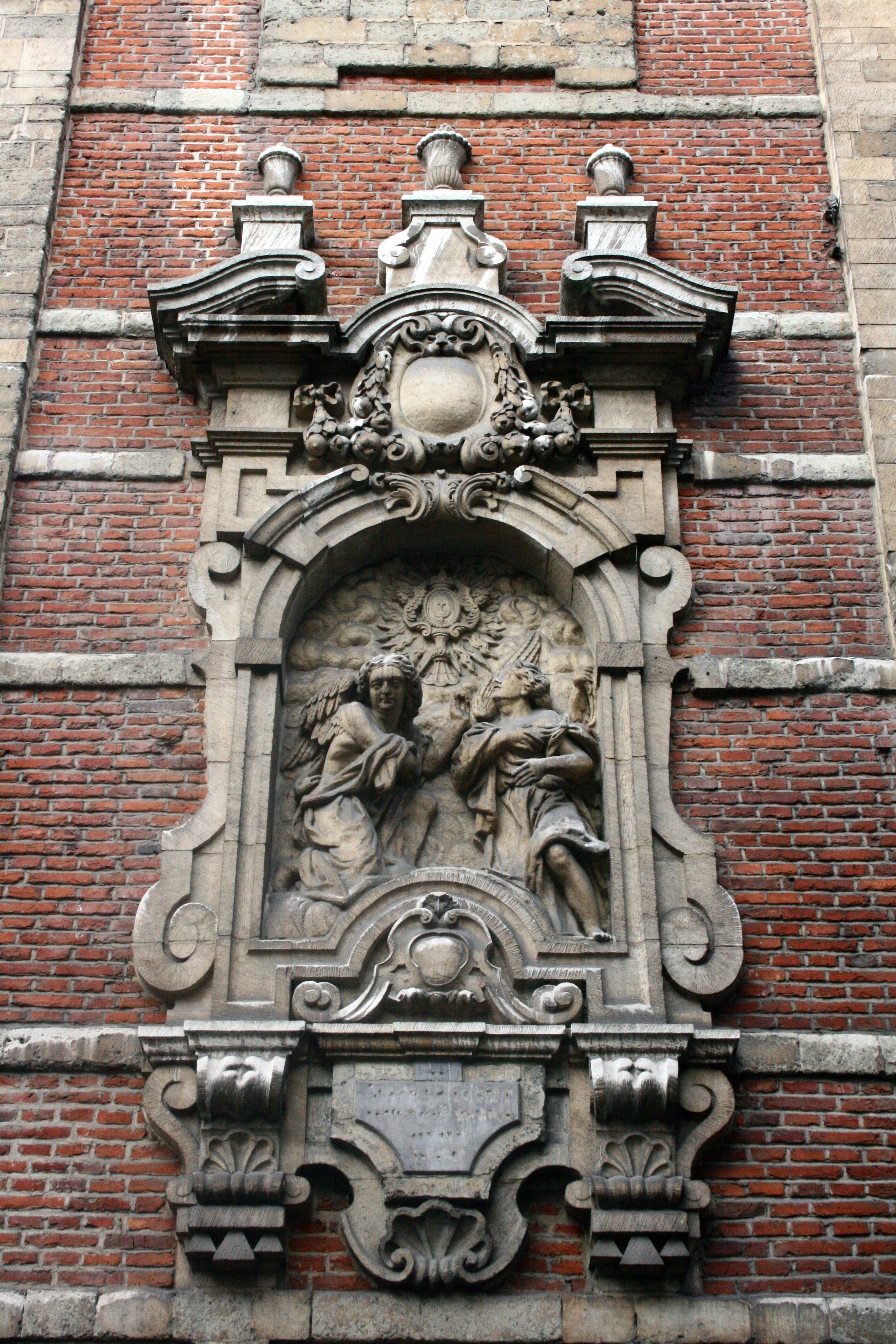 Église Notre-Dame aux Riches Claires (Bruxelles). Style baroque. Attribuée à L. Fayd'herbe (1680). Niche avec Adoration du Saint Sacrement placée au dos de l'abside